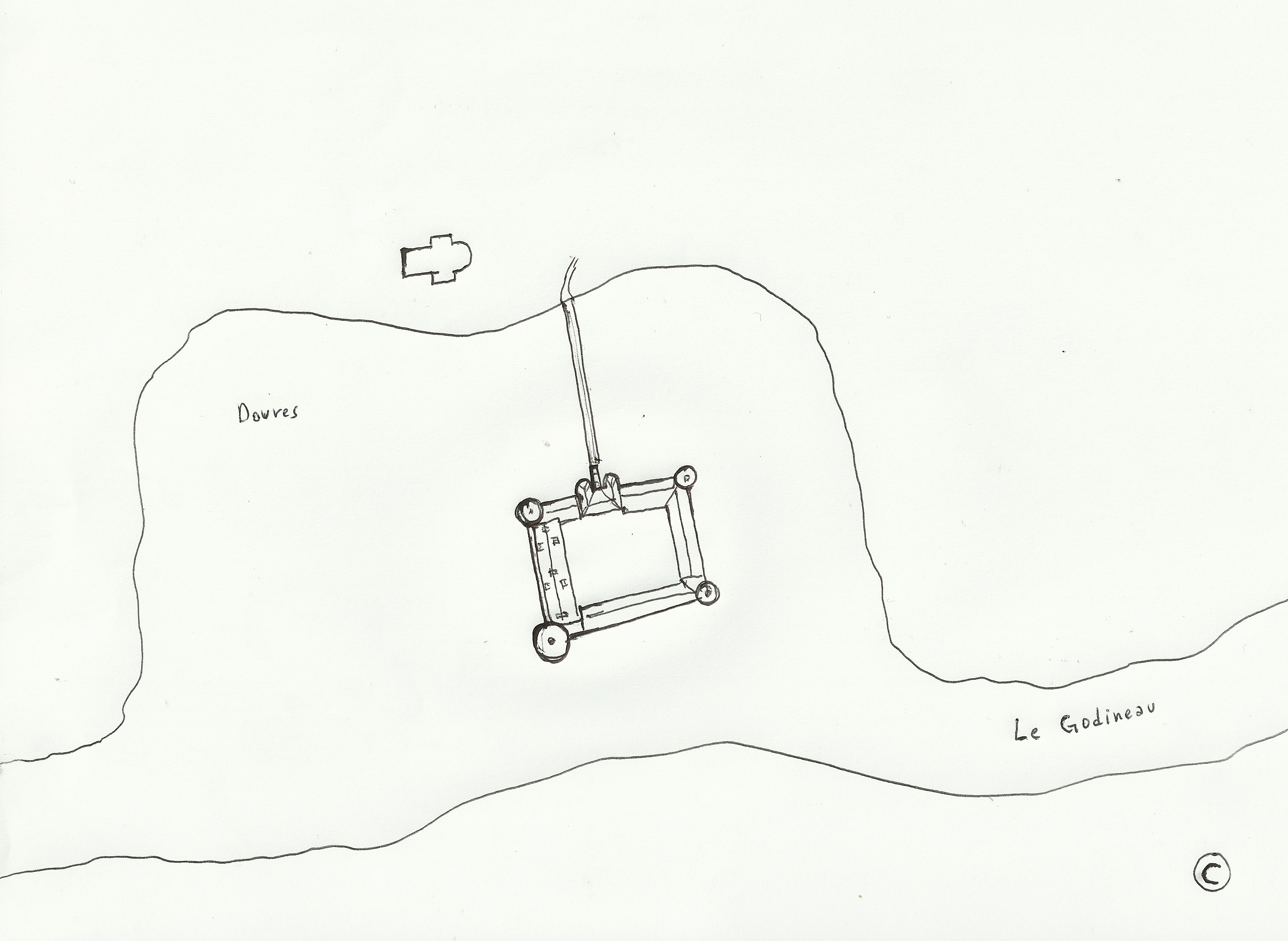 Plan présumé du Château médiéval de Belleville établi grâce à la description faite en 1798.